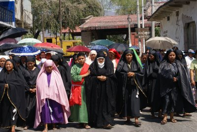 esta es una foto de fiestas de iguala gro.